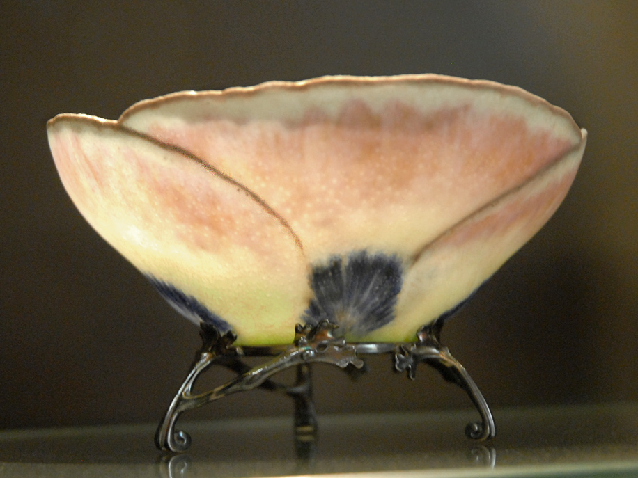 Coupe 1910 pâte de verre Albert-Louis Dammouse (1848-1926) Musée d'Orsay